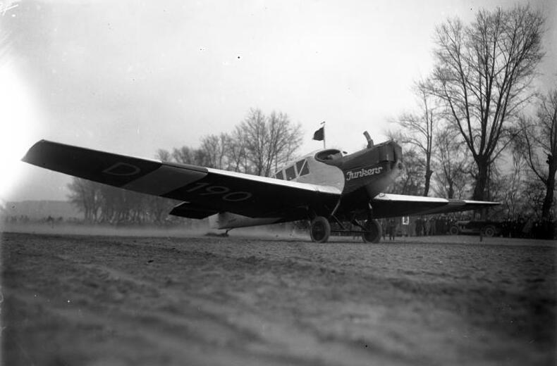 Flugzeugreise des Reichspräsidenten zur Leipziger Messe am 7. März 1923. Start des Flugzeuges mit dem Reichspräsidenten auf dem Tempelhofer Feld.